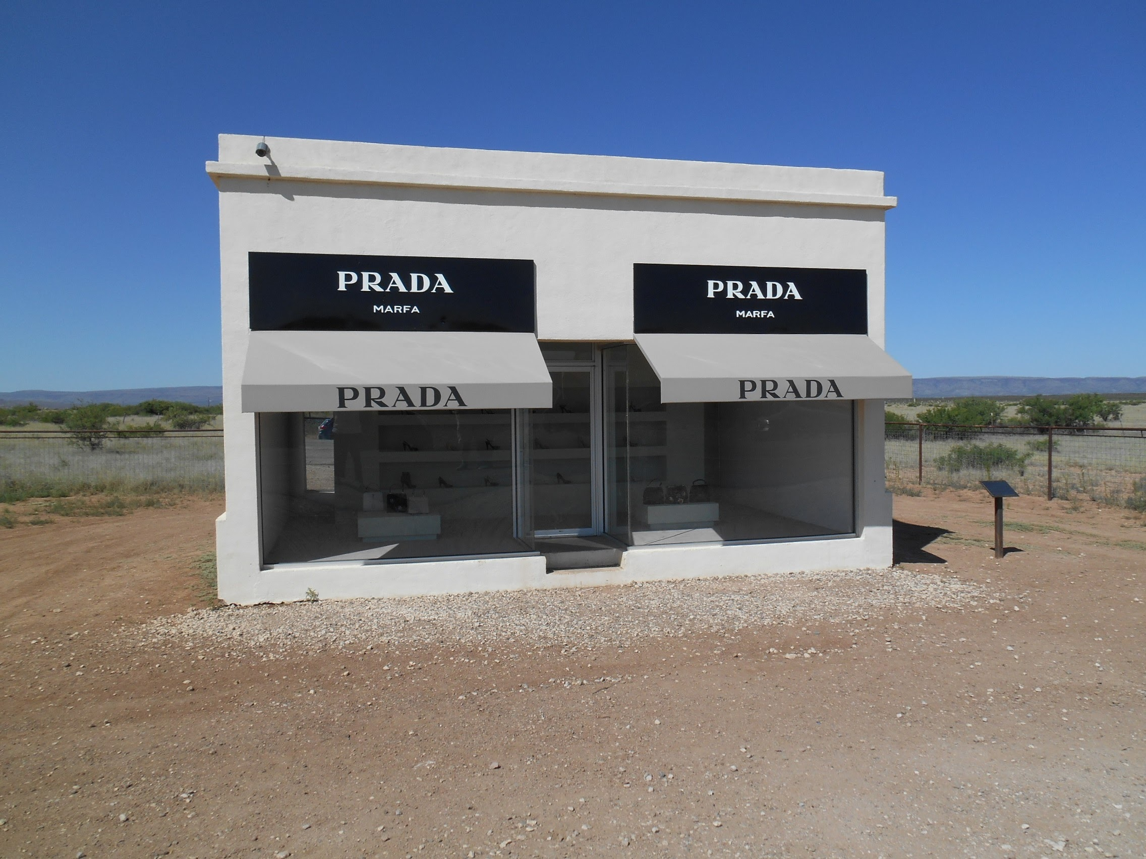 Prada Marfa